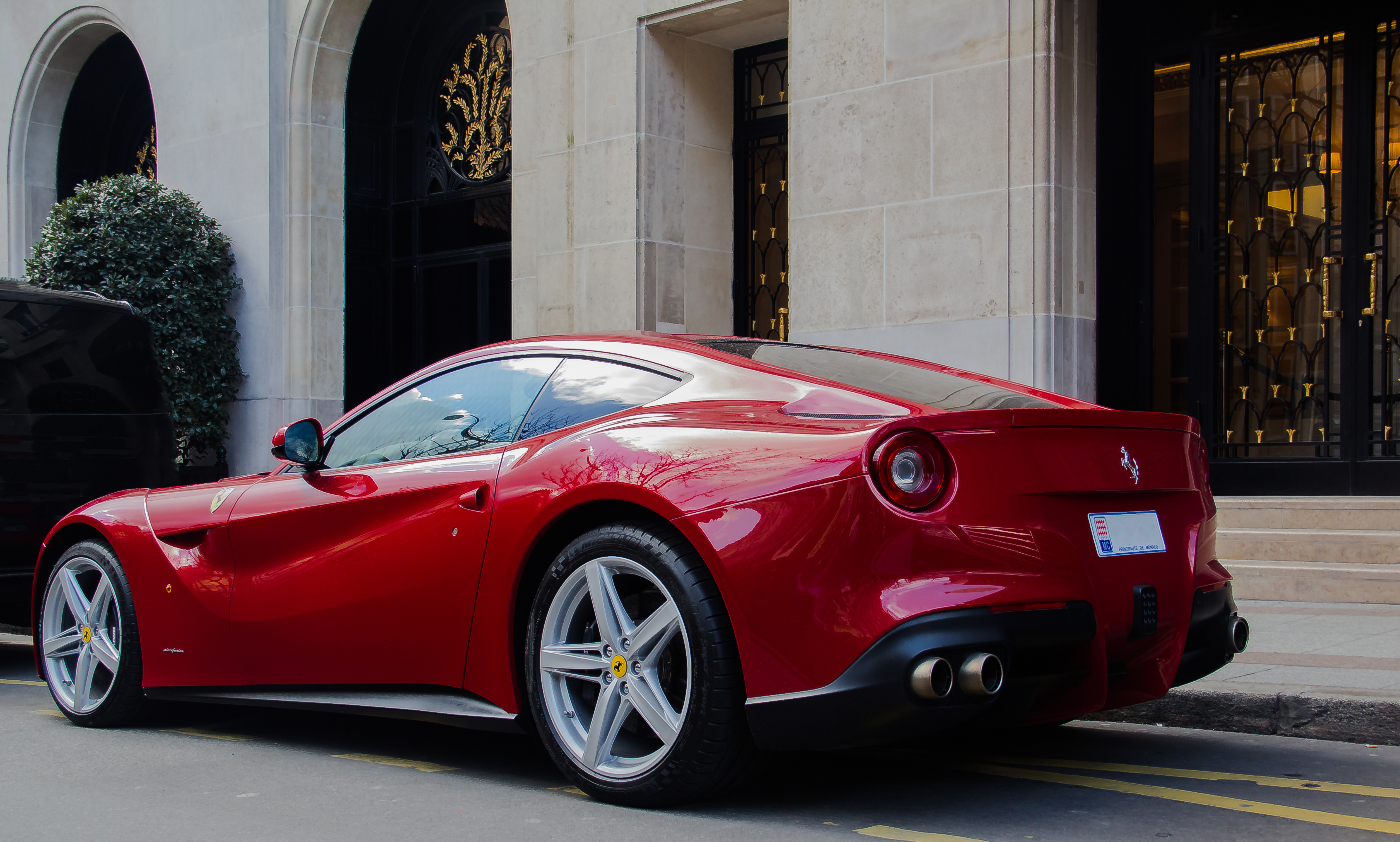 F12 berlinetta